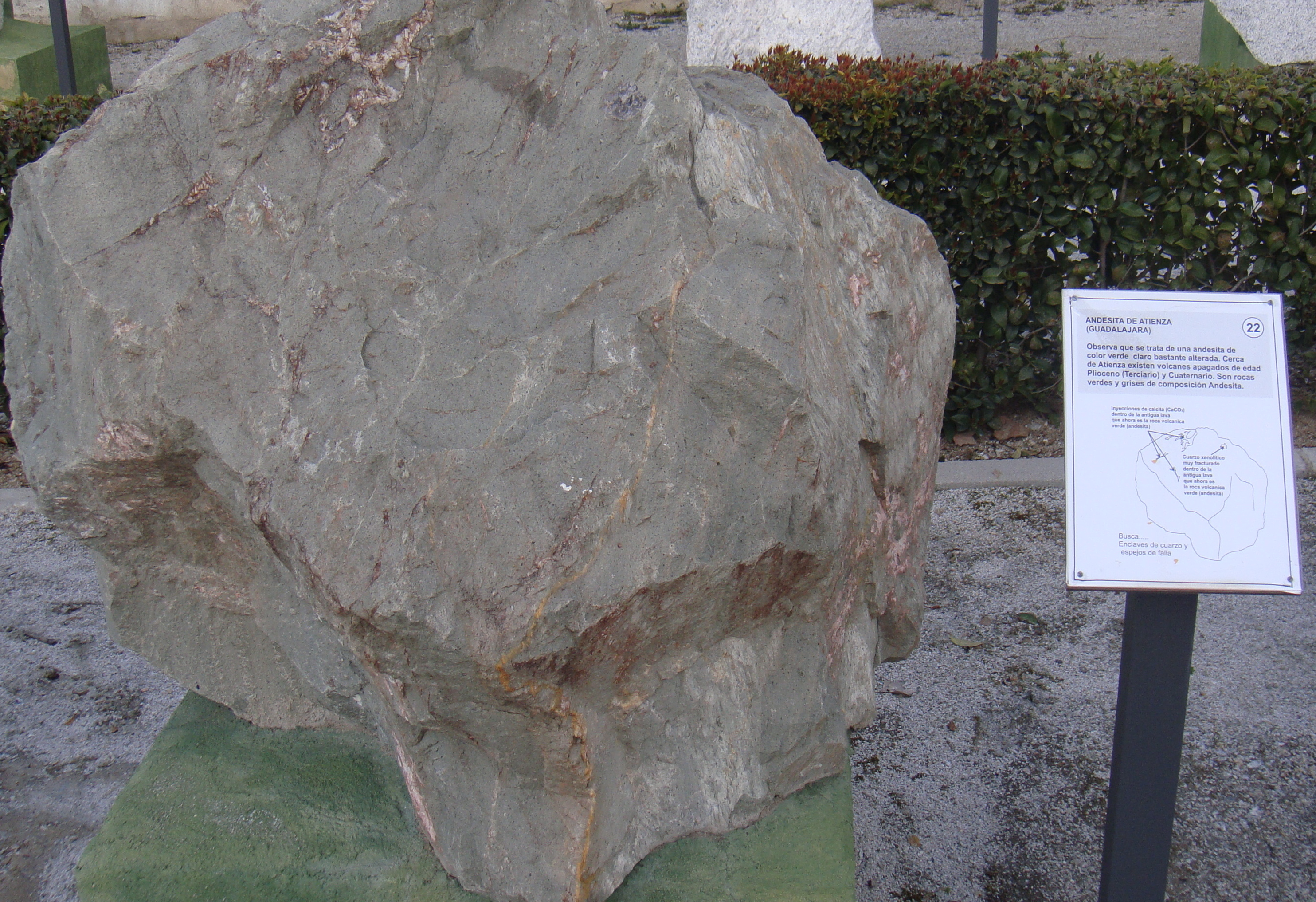 Parque museo ciclopeo andesita Atienza4